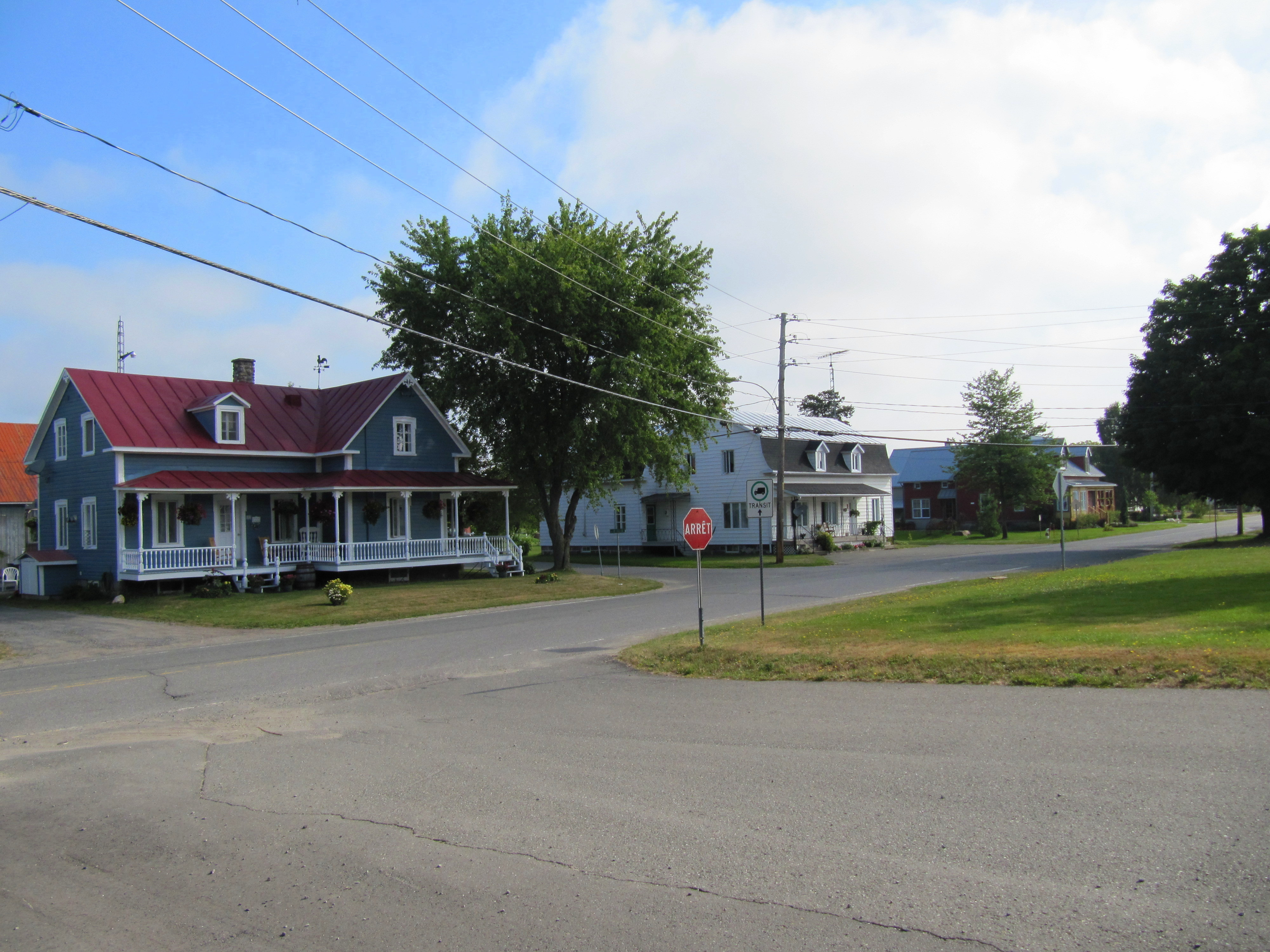 Trois maisons de la rue principale de Saint-Rosaire (Québec)